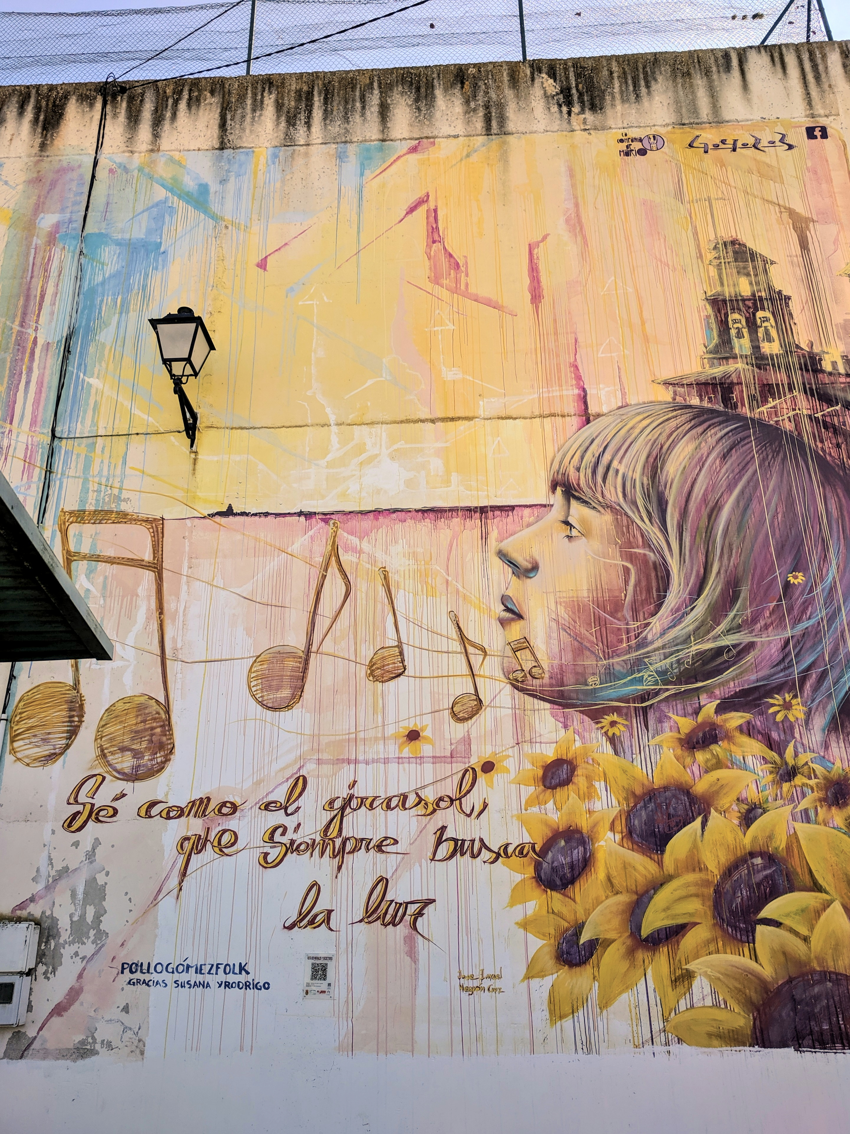 Mural en Villangómez (Burgos, España).